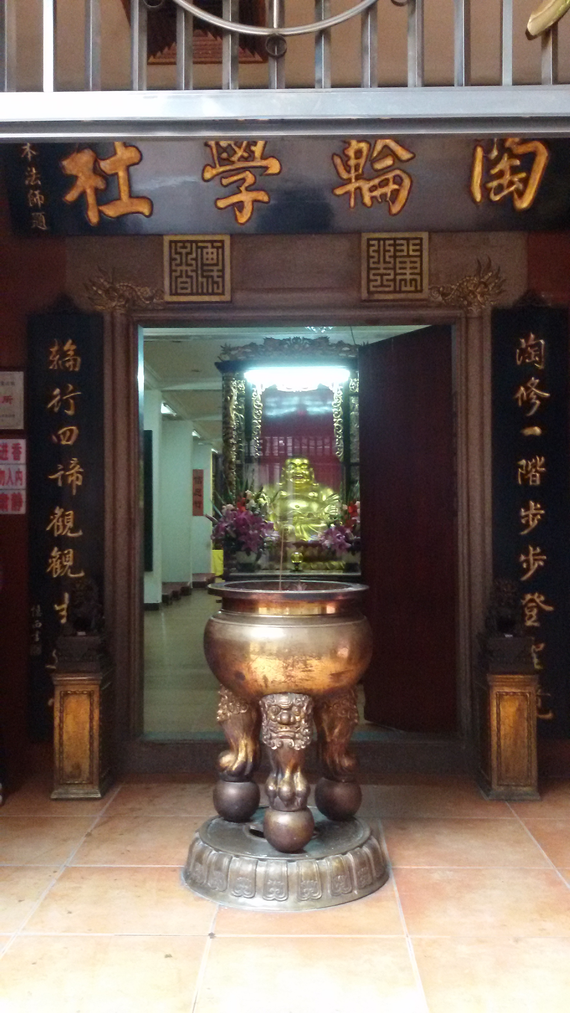 粵語: 陶輪學社嘅正門